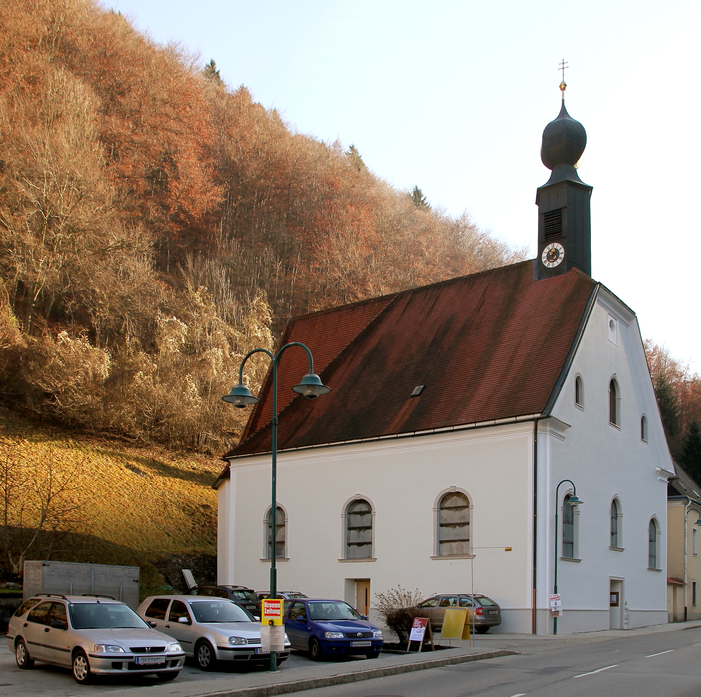 Katholische Pfarrkirche hl. Antonius von Padua in der niederösterreichischen Gemeinde St. Anton an der Jeßnitz. Die frühbarocke Hallenkirche wurde urkundlich 1683 erwähnt und 1691 geweiht. 1760 stürzte nach einem Brand der Turm und das Langhausgewölbe ein. Die Wiedererrichtung des Turmes erfolgte nur mehr als Dachreiter.